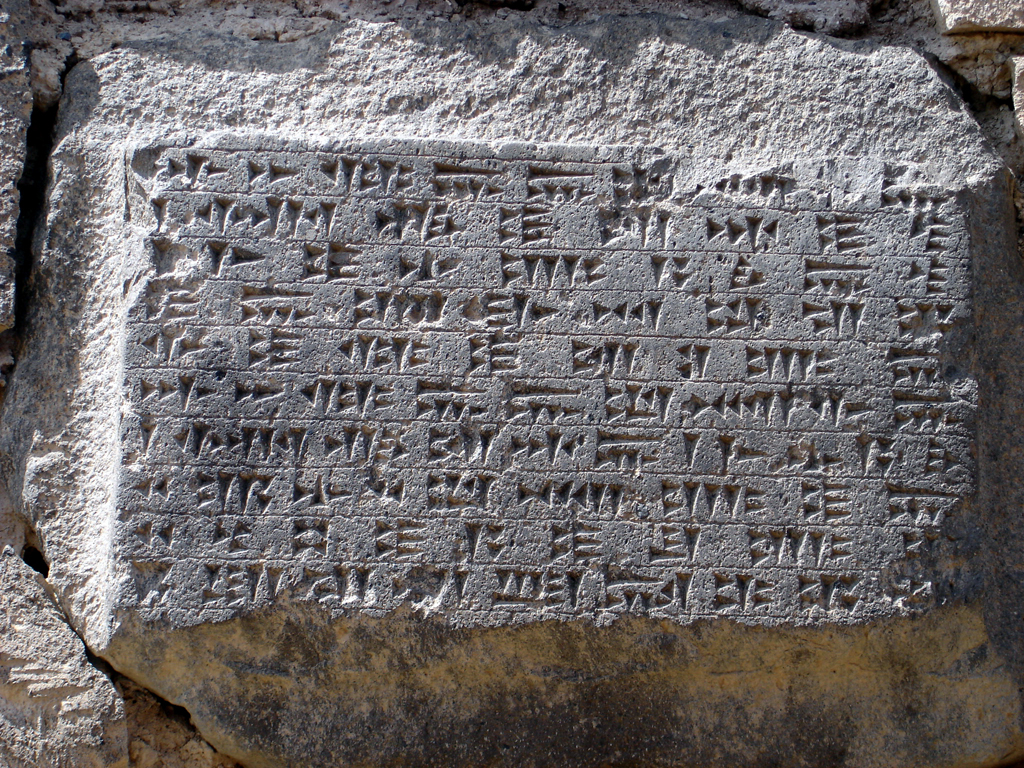 Erevan, la forteresse d'Erébouni